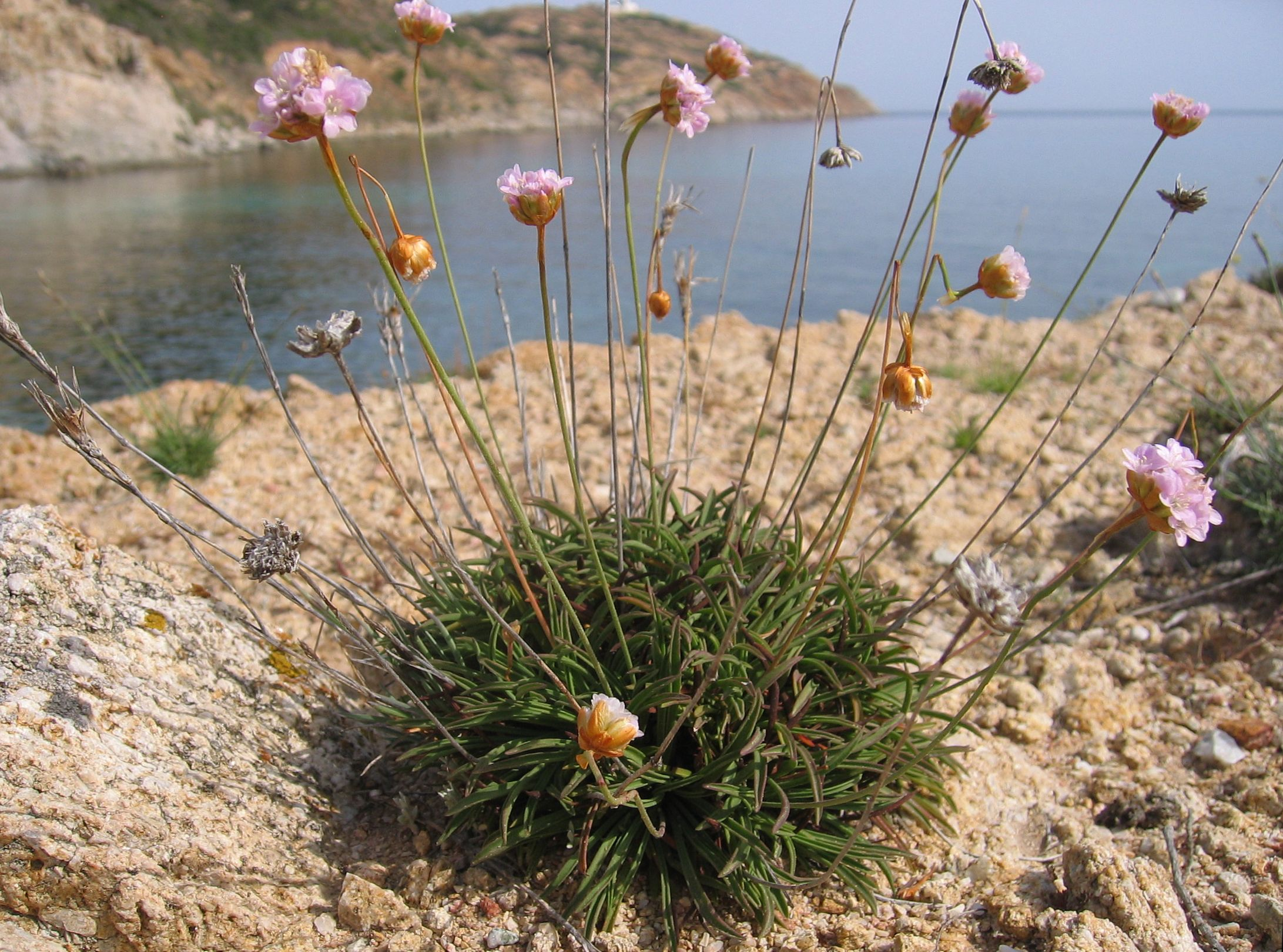 Armeria soleirolii La Revellata, Corse, France